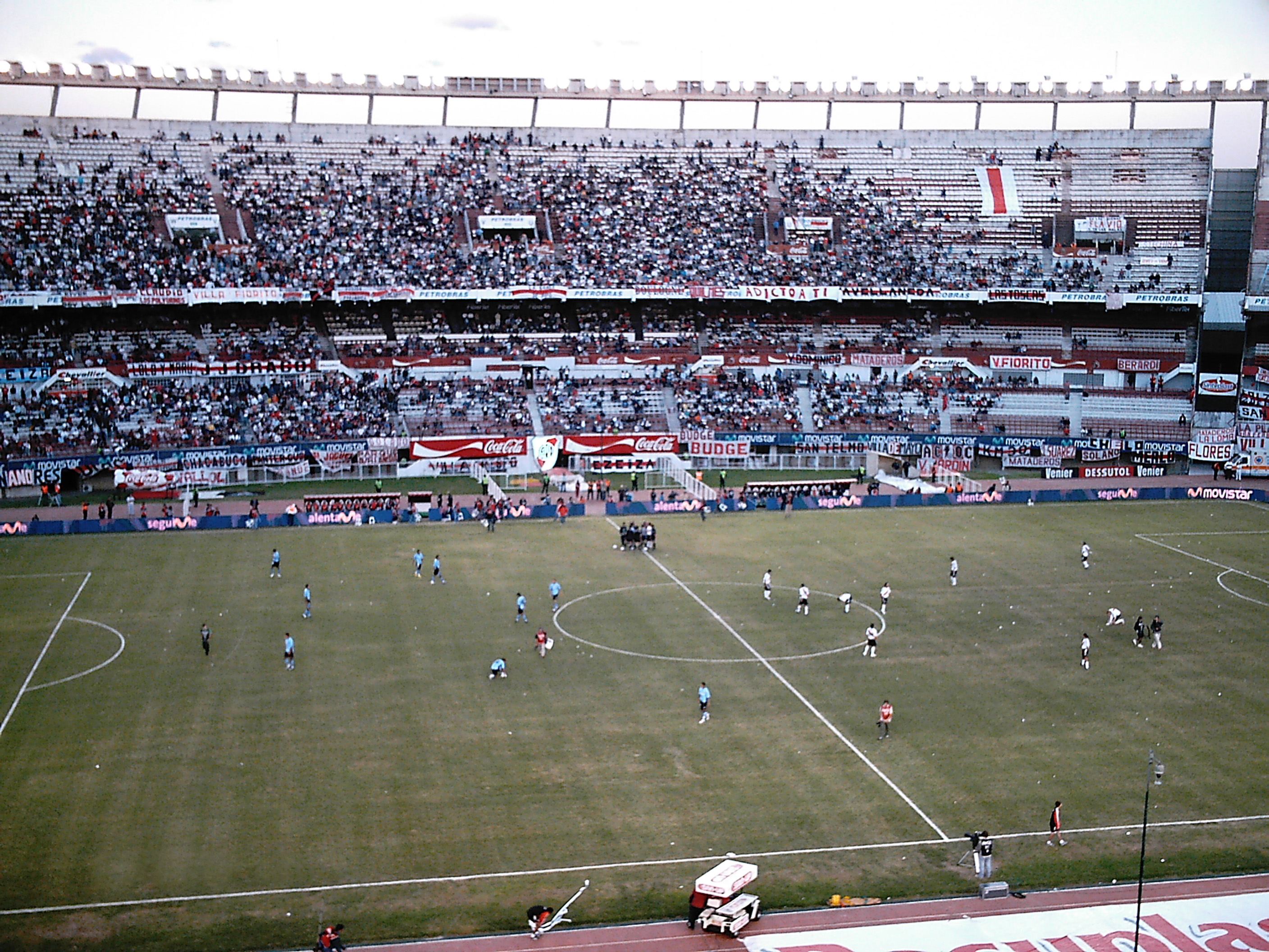 Estadio Monumental de River Plate